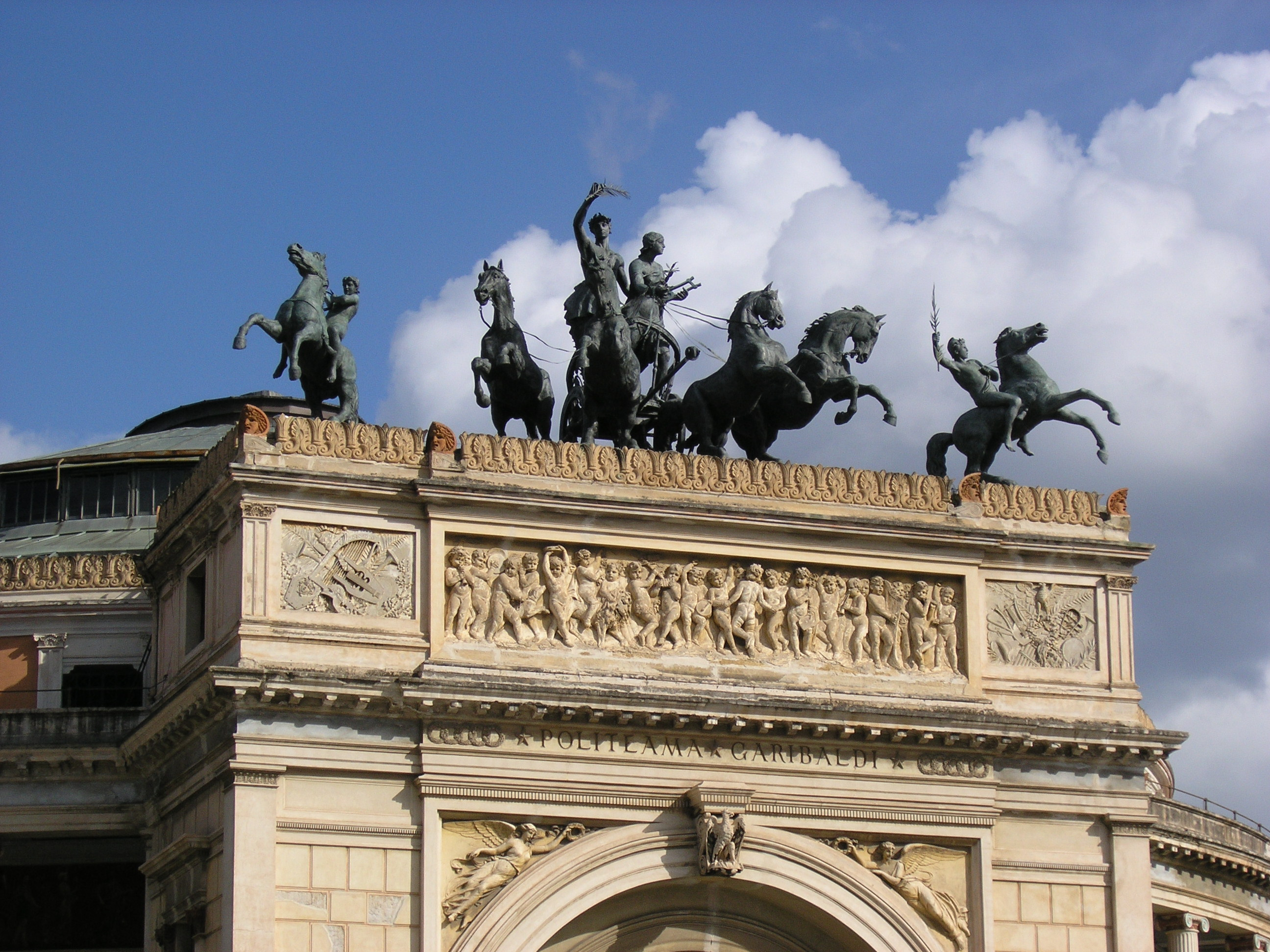 Sicilianu: Palermo, Tiatru Politeama